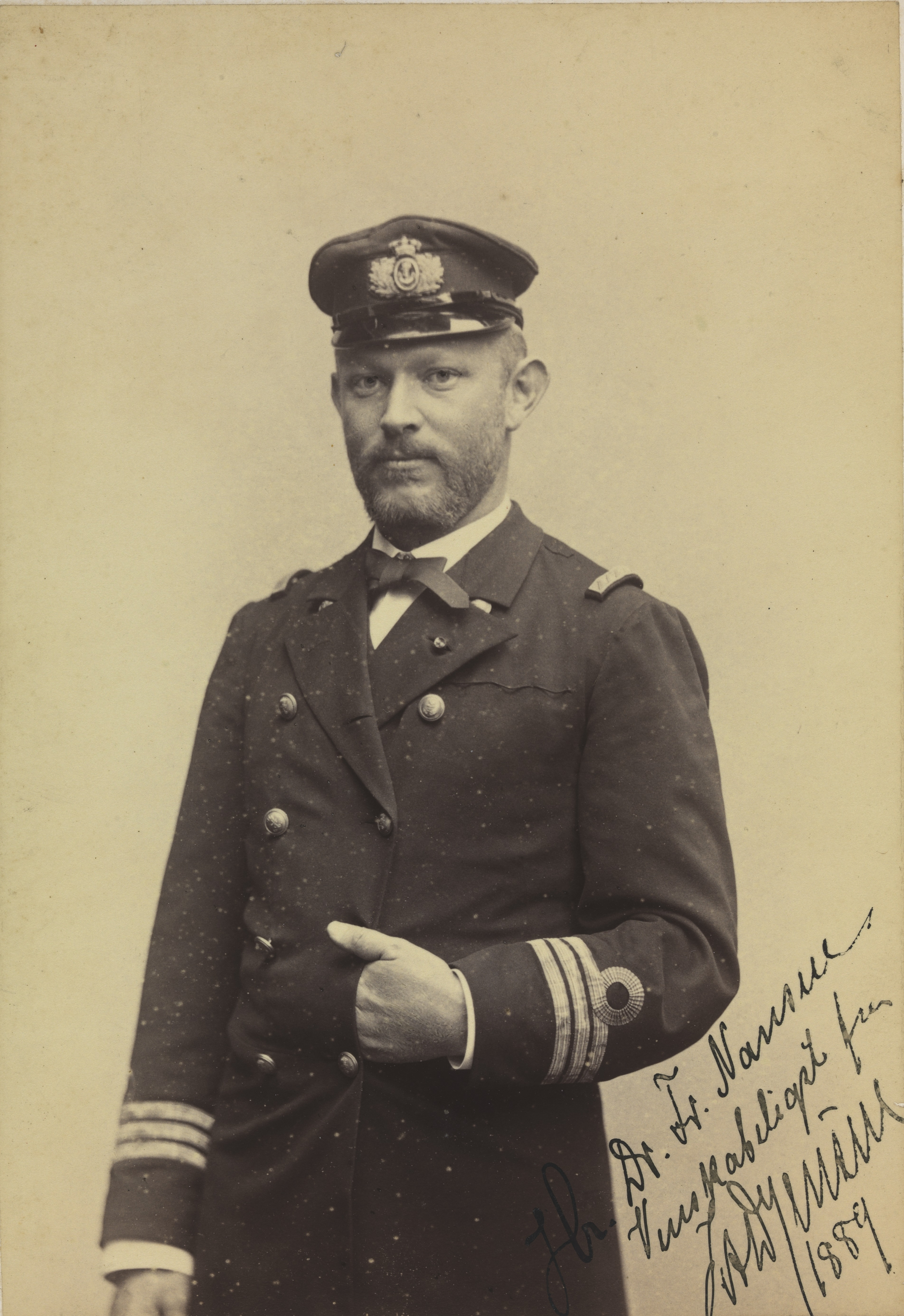 Jens Arnold Diderich Jensen, dansk sjøoffiser. Med dedikasjon. Depicted person: Jensen, Jens Arnold Diderich (1849-) Depicted place: Danmark, København